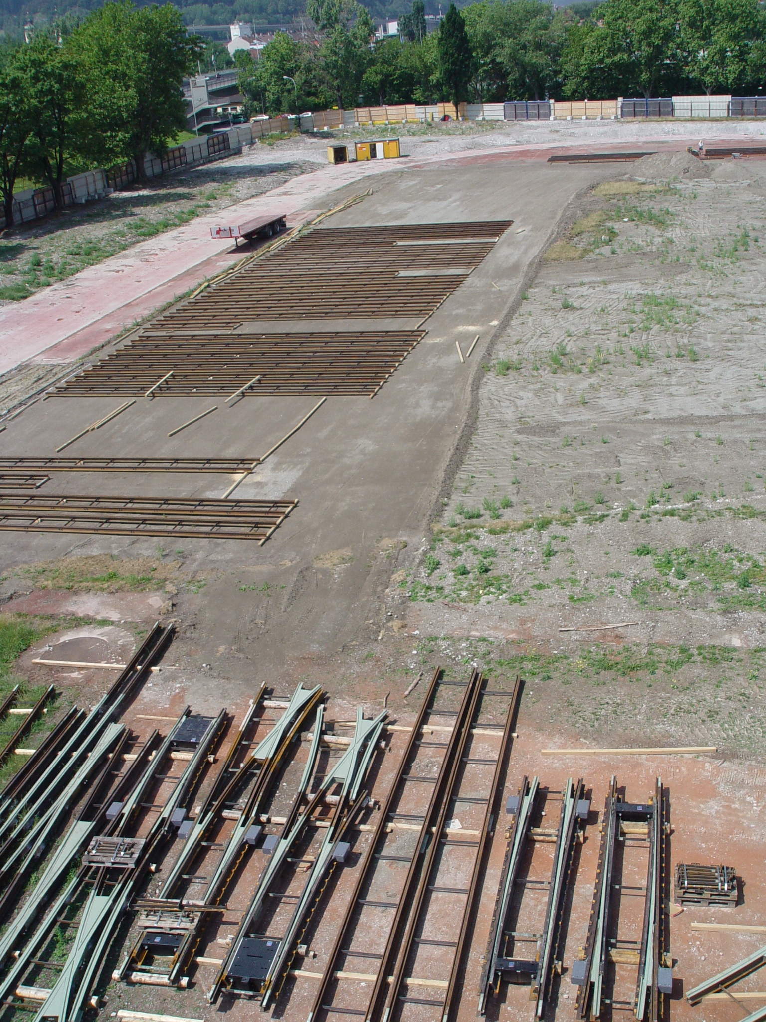 Schienen für den Ausbau der Regianlabahn aufgelegt im ehem. Tivoli-Stadium in Innsbruck